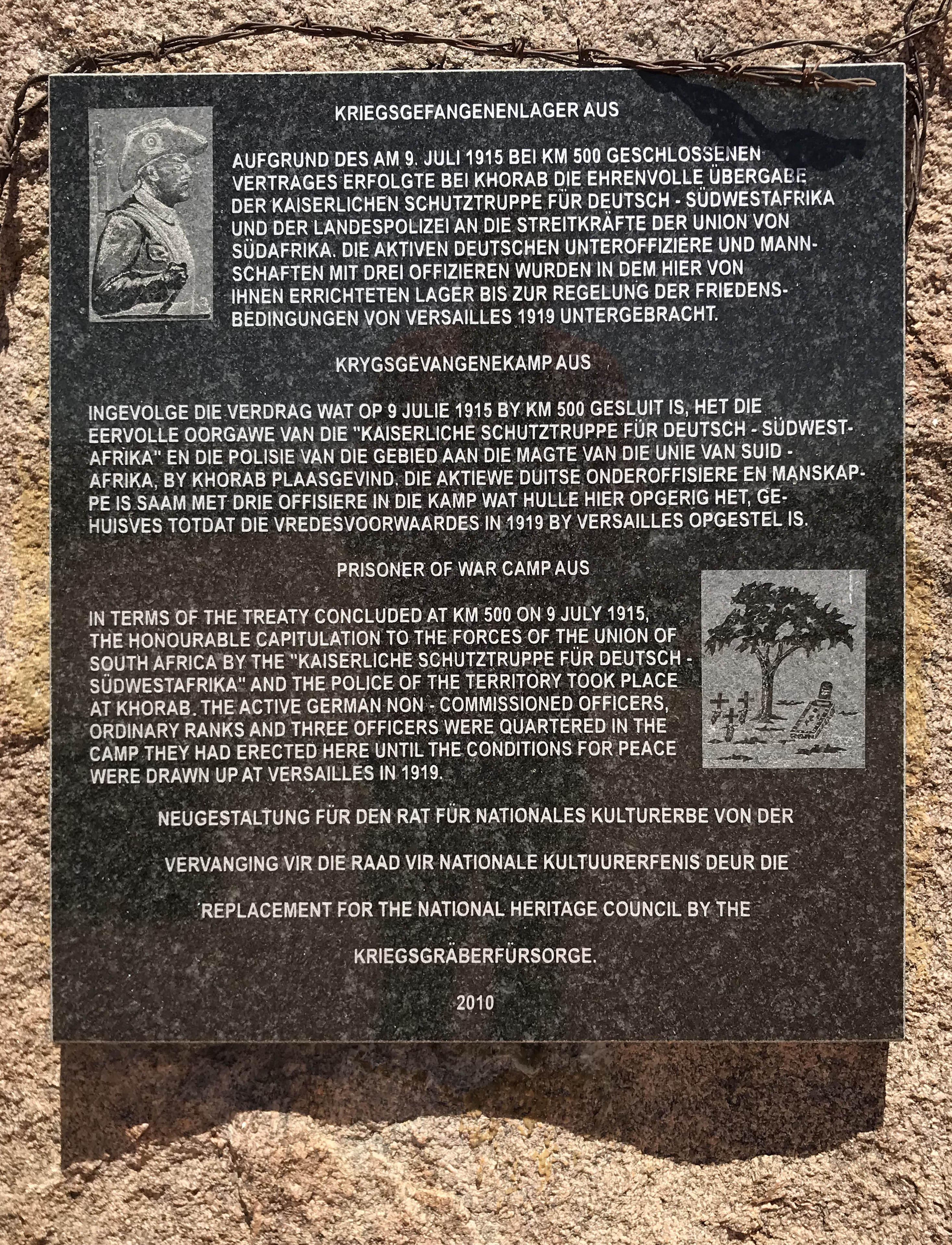 Gedenkstätte im Kriegsgefangenenlager Aus, Namibia